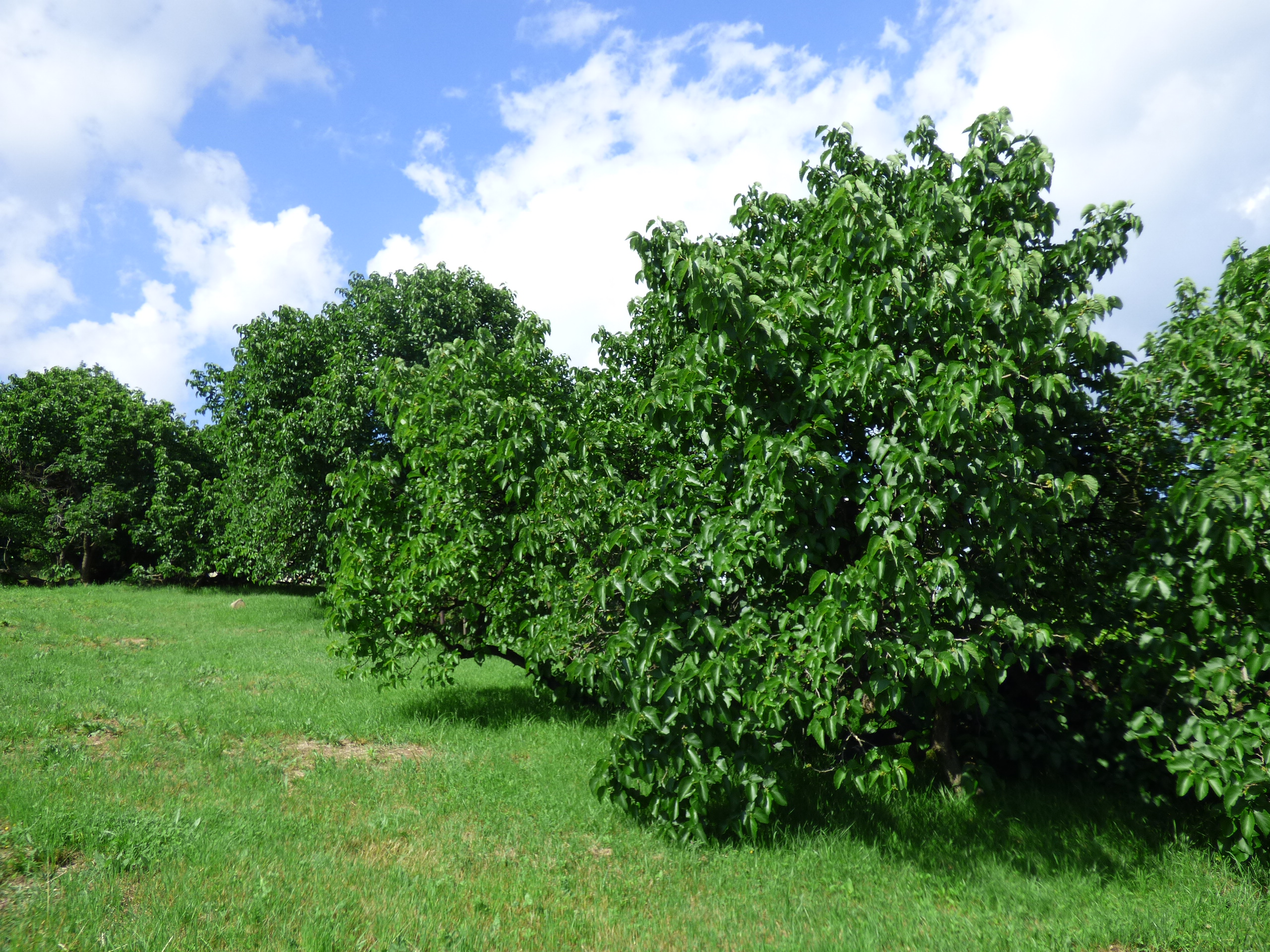 Trojica stromov moruše čiernej (morus nigra) v Pukanci